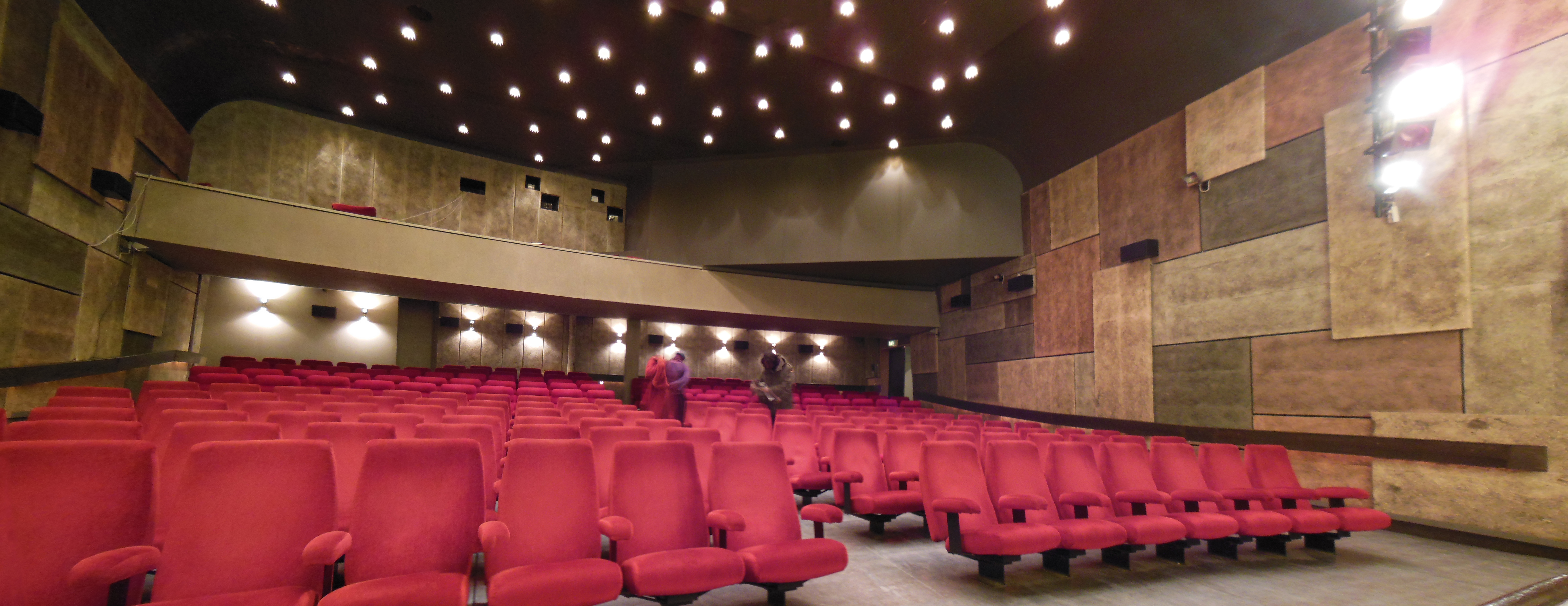 Panorama över salong 1 i biografen Capitol i Göteborg.